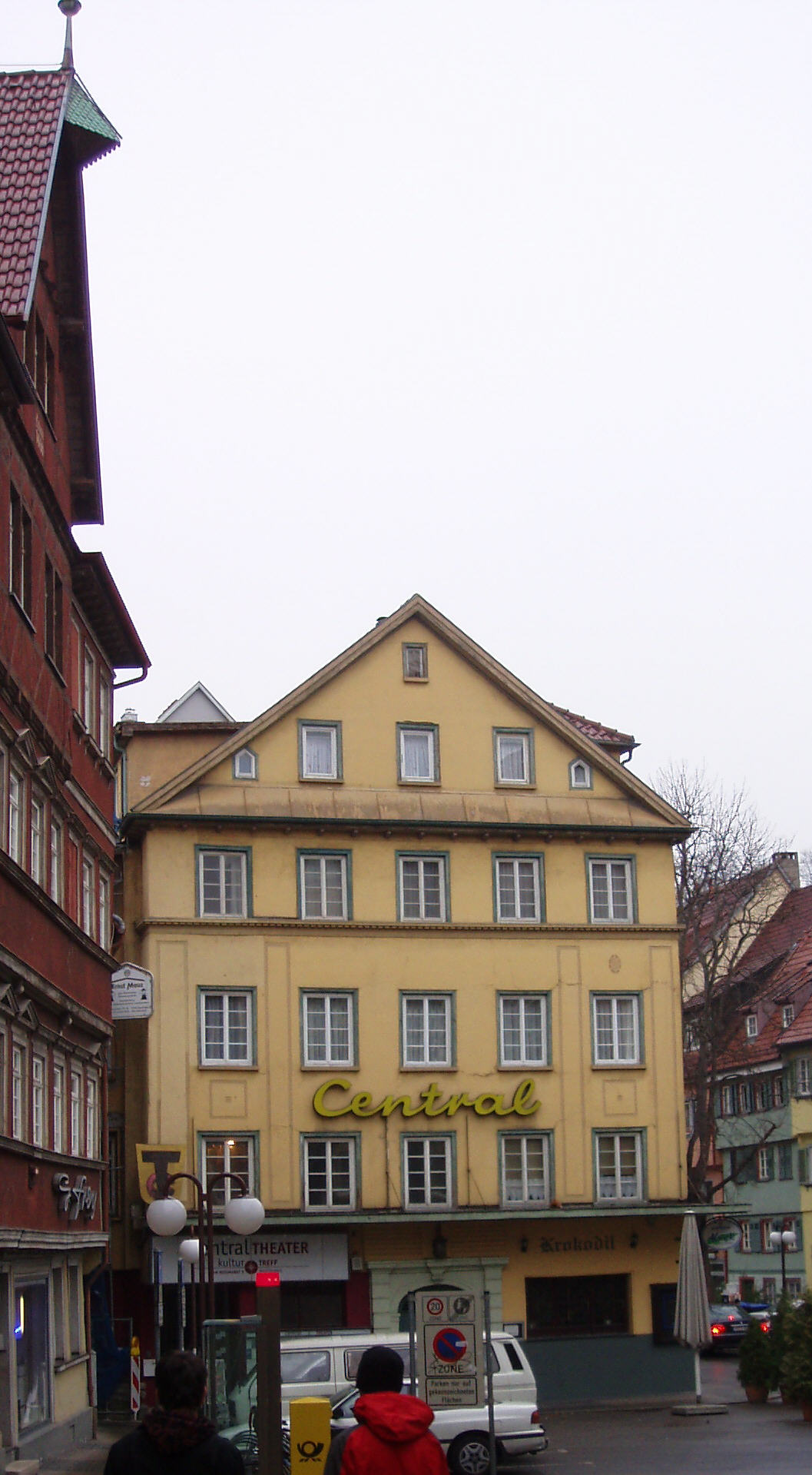 Lichtspielhaus Central, Esslingen